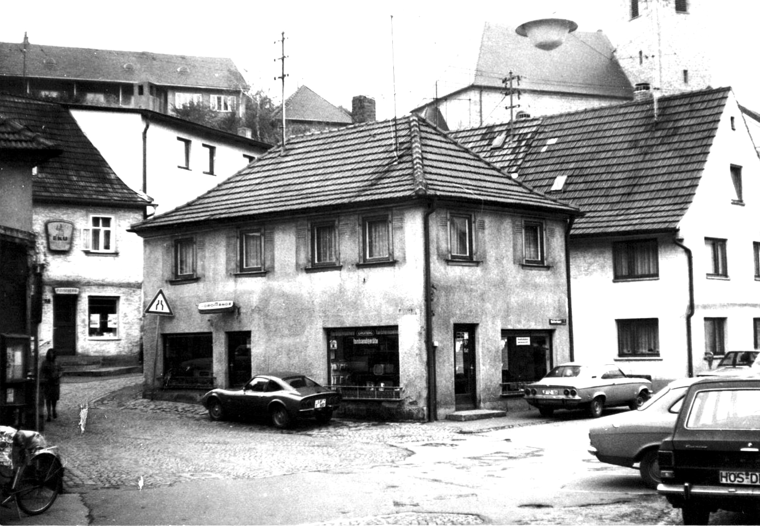 Der Weihersbach (Straßen-/Platzname) um 1975. Das Haus in der Bildmitte wurde zum Ausbau der Rangengasse 1978, das Haus rechts dahinter ca. 2005 abgerissen